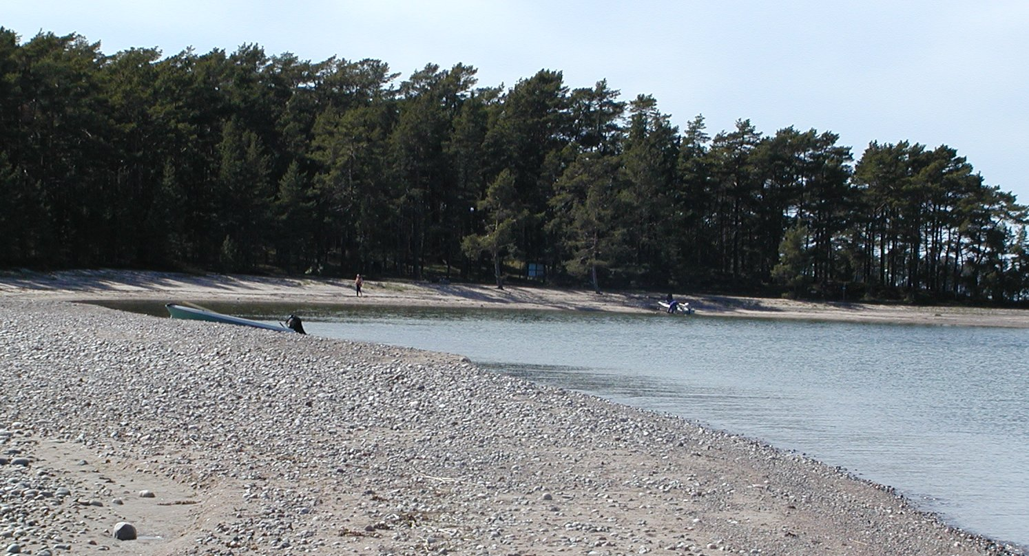 Sandön (i Skärgårdshavet), norra stranden.